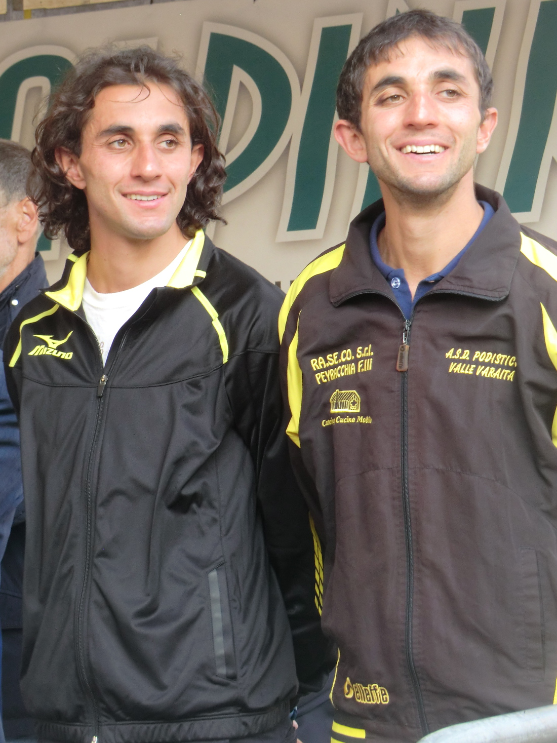 Bernard e Martin Dematteis all'inaugurazione delle Alpiniadi estive 2014